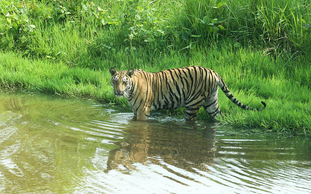 বঙ্গবন্ধু শেখ মুজিব সাফারি পার্ক